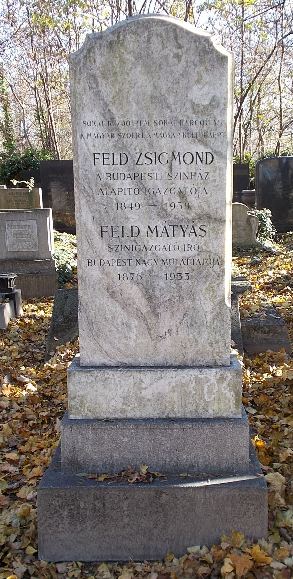 Feld Zsigmond (1849-1939) és Feld Mátyás (1876-1953) színigazgatók sírja a Kozma utcai izraelita temetőben [1/A-1-25] (Budapest, X. ker., Kozma utca 6.)